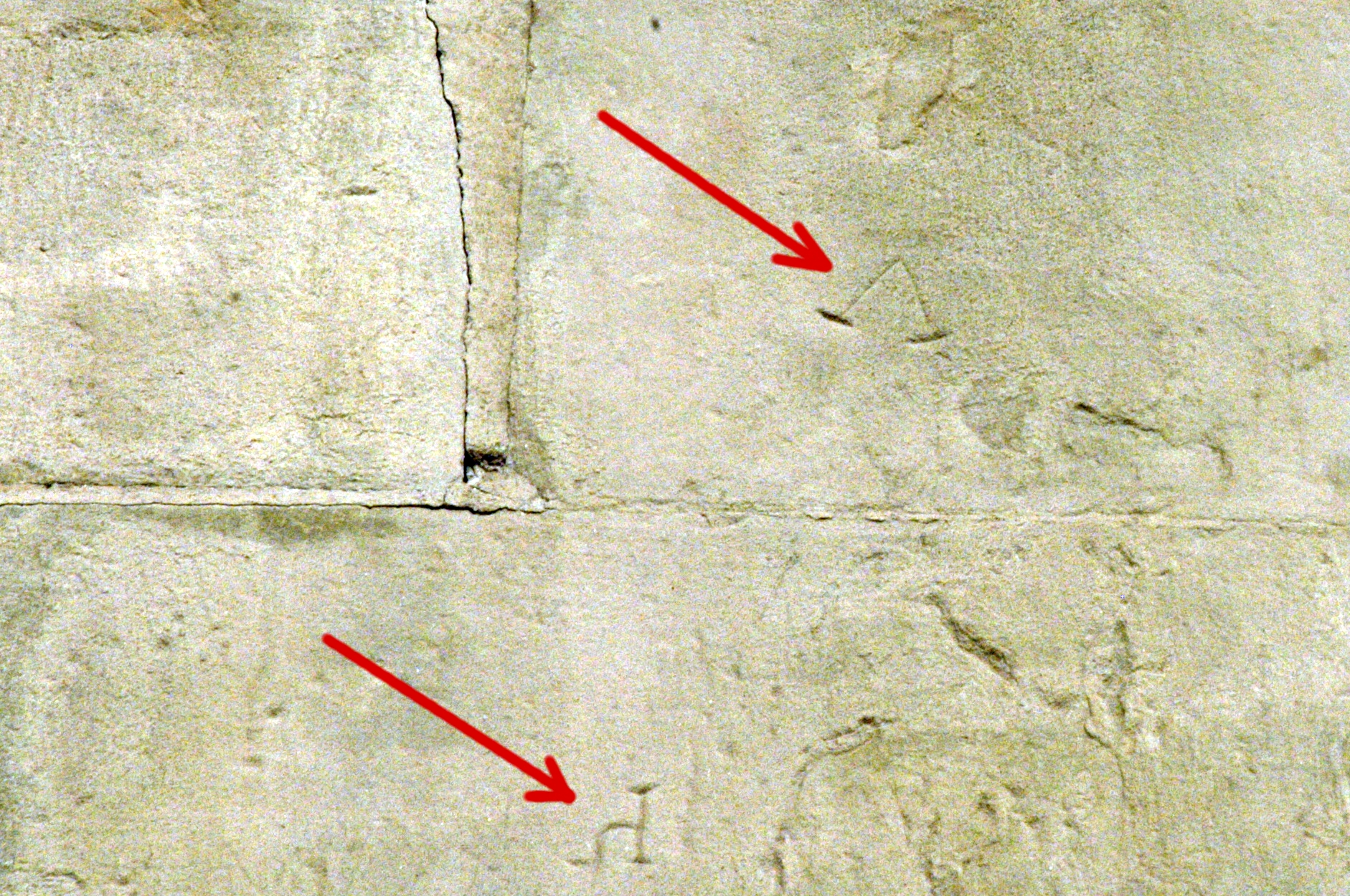 Katholische Pfarrkirche Maria Geburt in Schöngrabern, Gemeinde Grabern - Zwei Steinmetzzeichen an der Südfassade